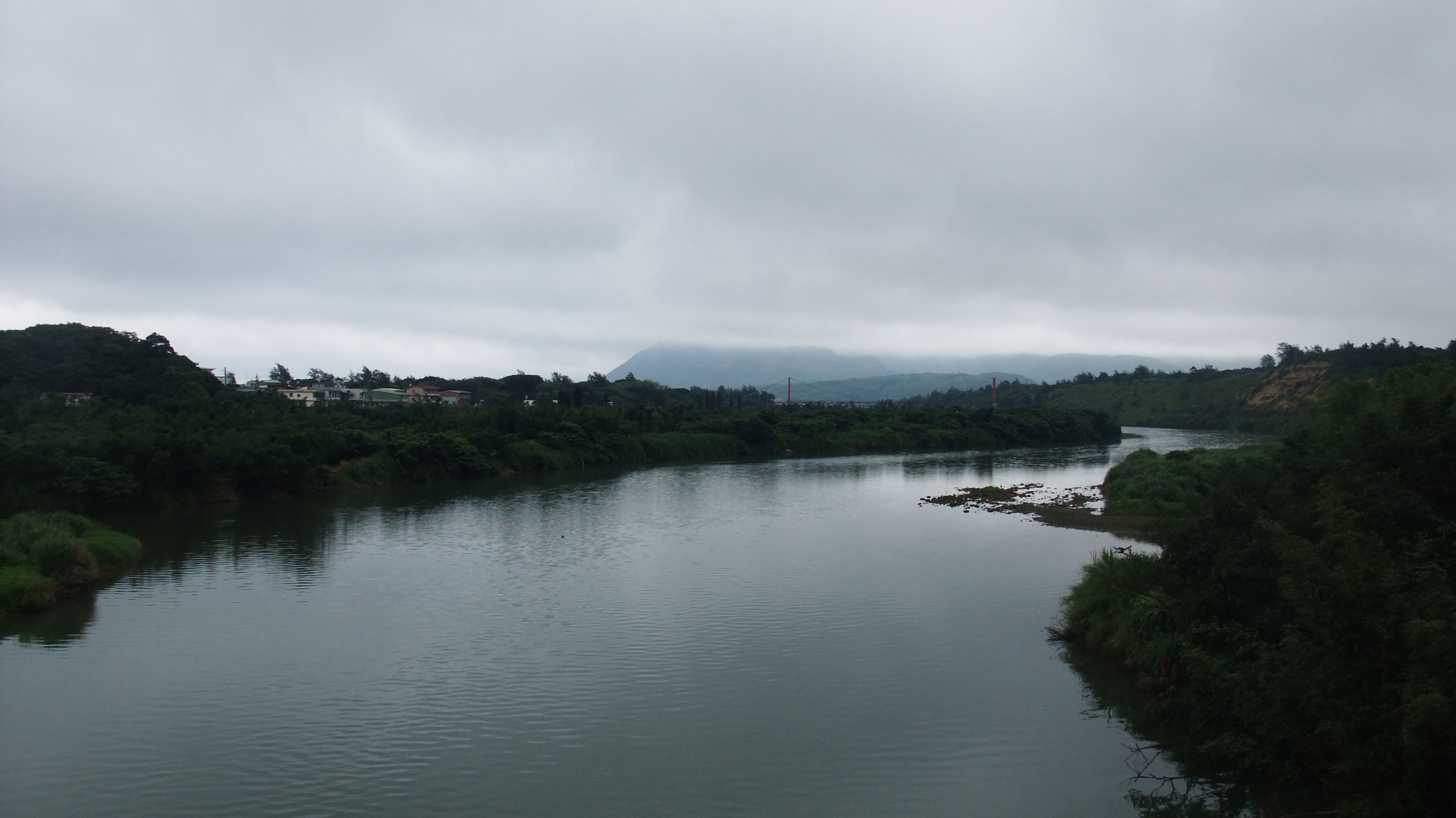 鹽寮溪一景